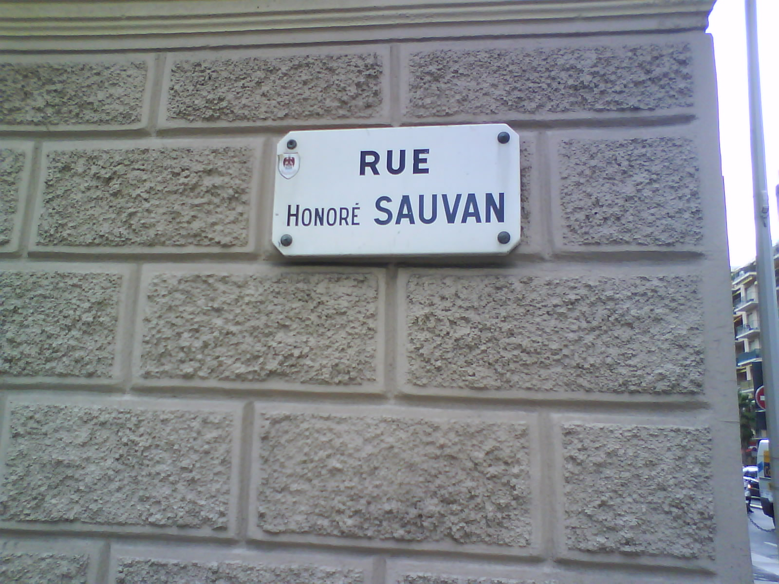 Rue Honoré SAUVAN à Nice